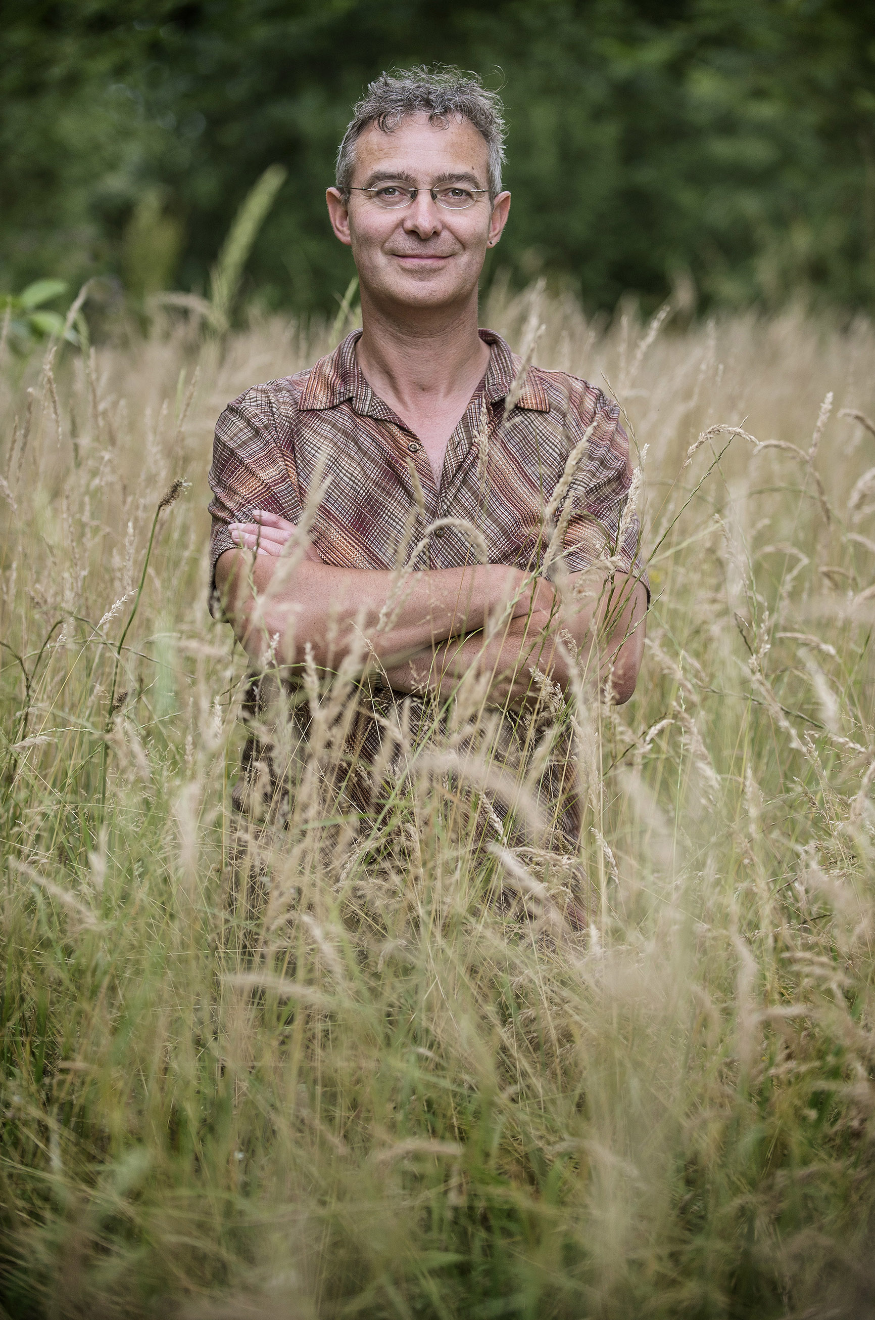 Vlaams schrijver Elvis Peeters